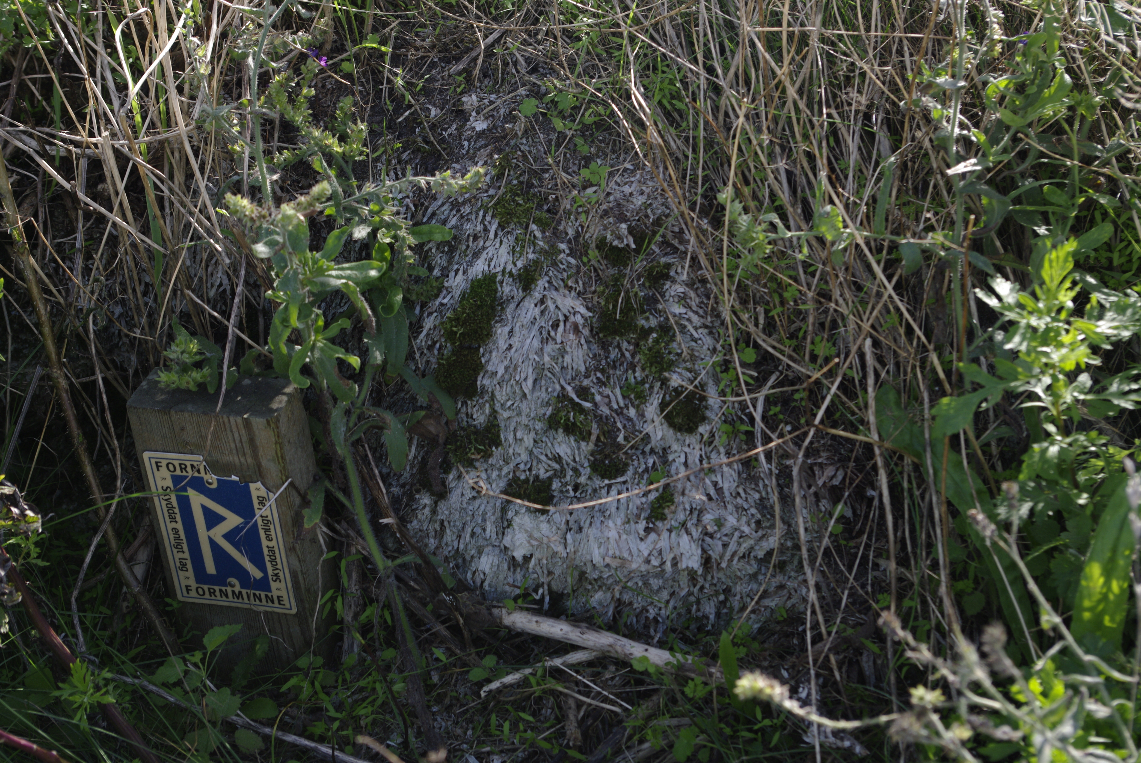 Detalj av tångvall intill Skanörs kyrka